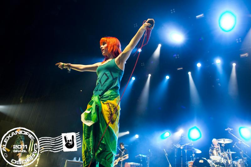 Paramore ao vivo no Credicard Hall - 20 de fevereiro de 2011 - São Paulo, SP, Brasil.